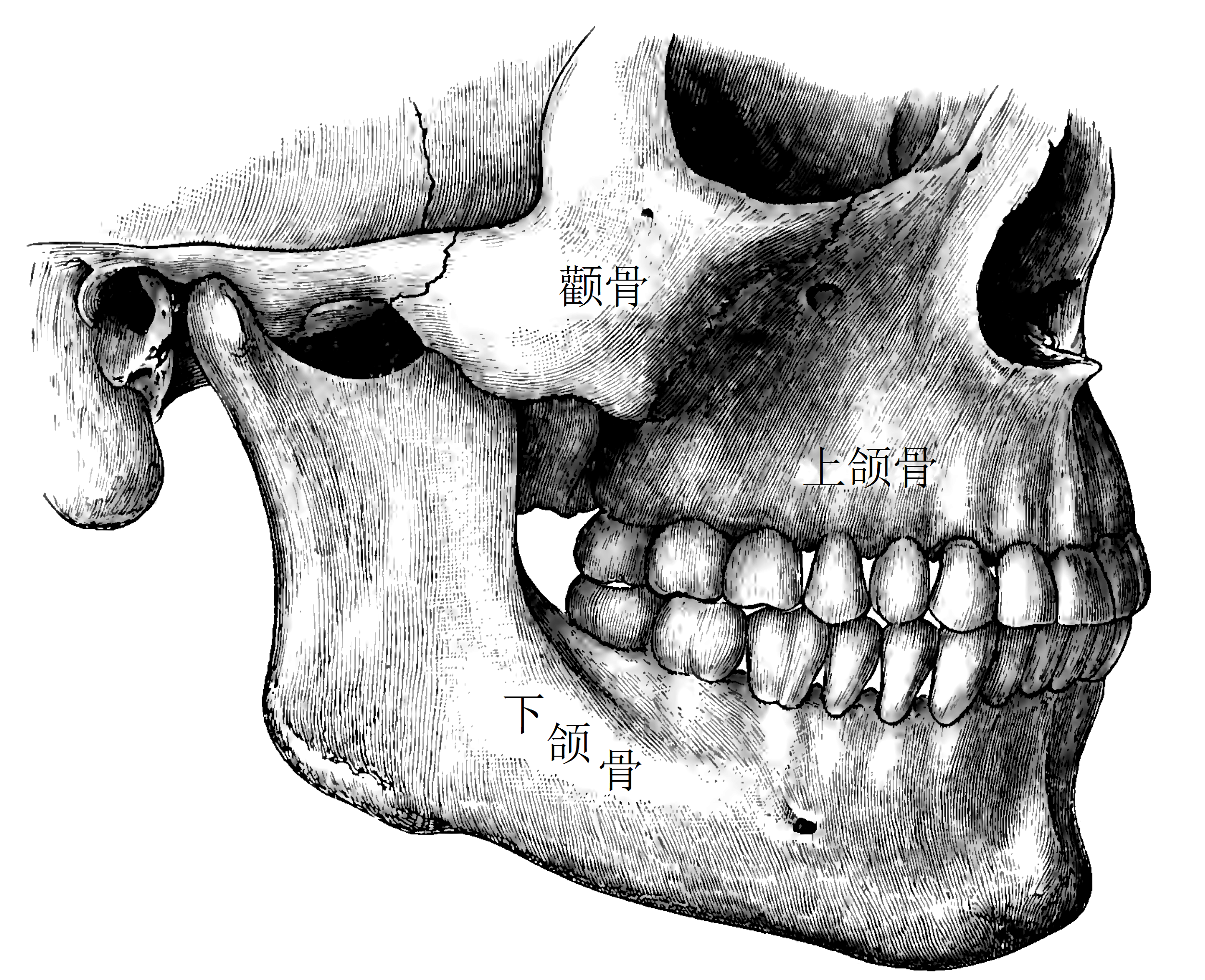 牙齿和下颚侧视图。